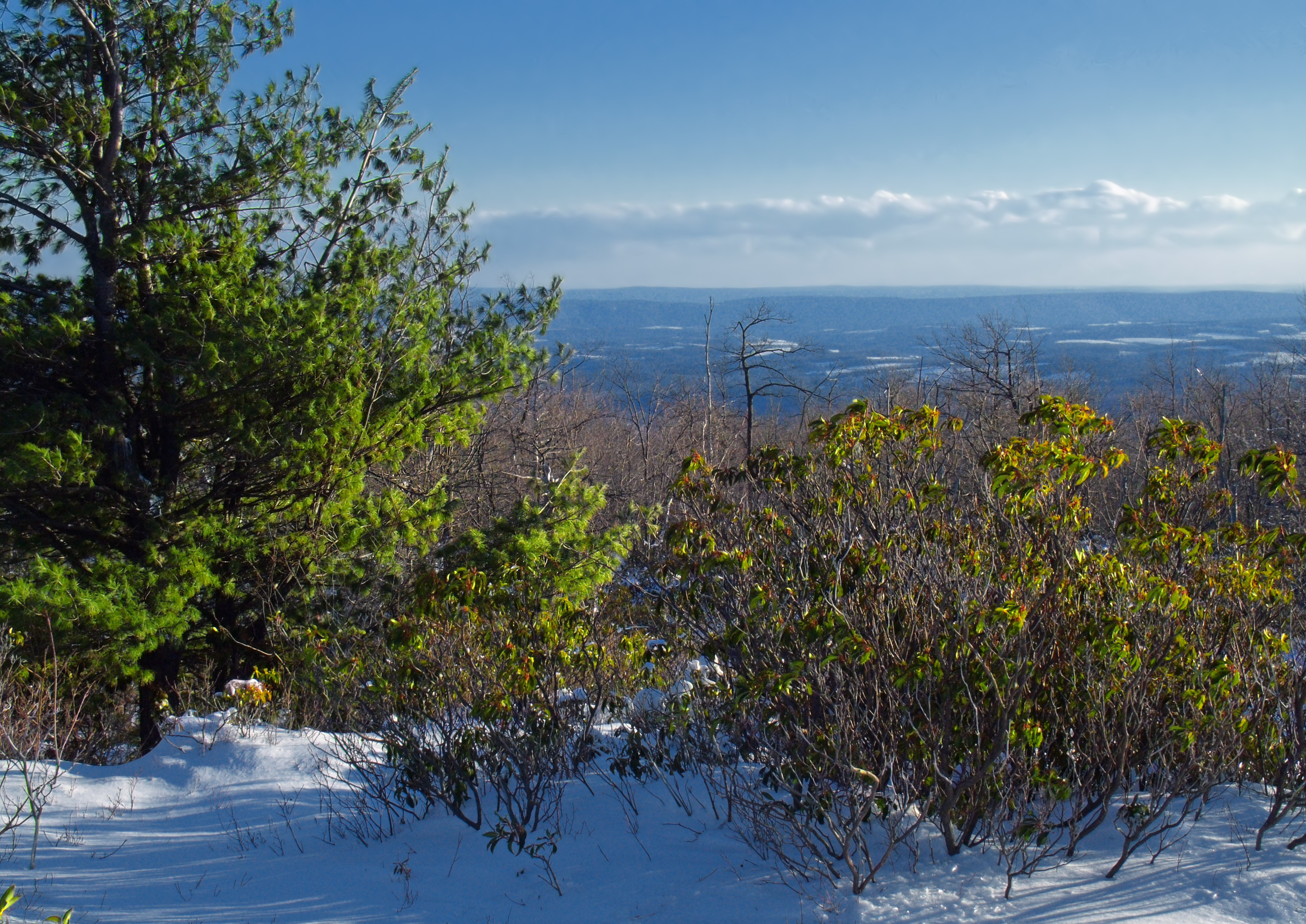 Ricketts Glen State Park, Luzerne County.